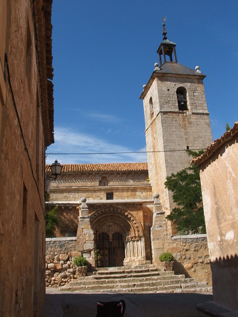 Caltójar (Soria). Portada meridional, enmarcada en cuerpo resaltado y rematado con canecillos de rollos. Tiene cinco arquivoltas apoyadas sobre cinco pares de columnas, con capiteles ya góticos. En el tímpano están calados dos arcos de medio punto con intradós de puntas de diamante. El resto del tímpano lo ocupa un bajorrelieve grande y de tosca factura que representa un guerrero con escudo.